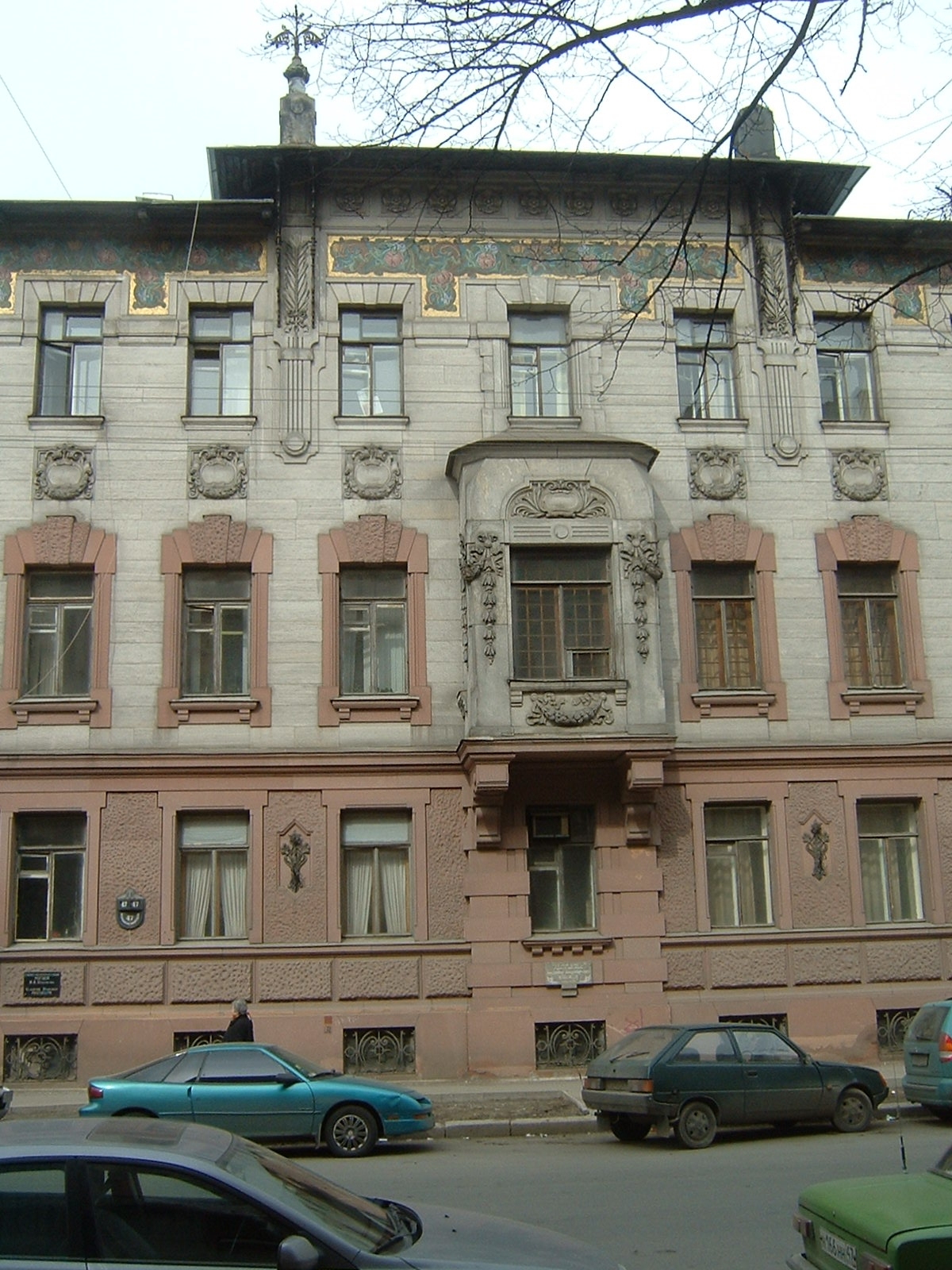 Nabokov House